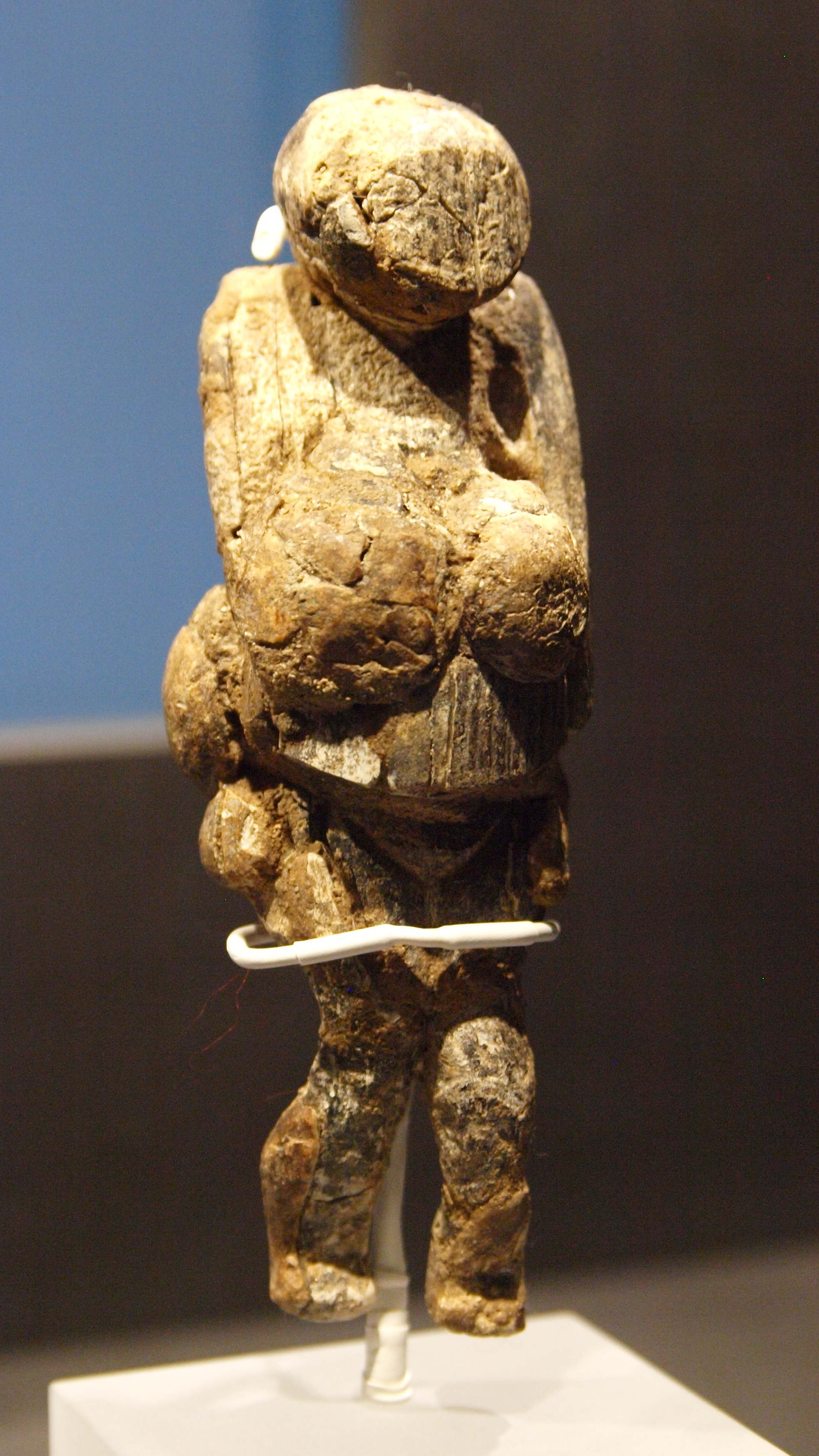 Frauenstatuette von Gagarino, Mammutelfenbein, Gravettien ca. 23.000 BP, Original, ausgestellt im Archäologischen Museum Hamburg (Eiszeiten - Die Kunst der Mammutjäger vom 18. Oktober 2016 bis 14. Mai 2017). Aufbewahrungsort sonst Kunstkammer Sankt Petersburg, Russland.